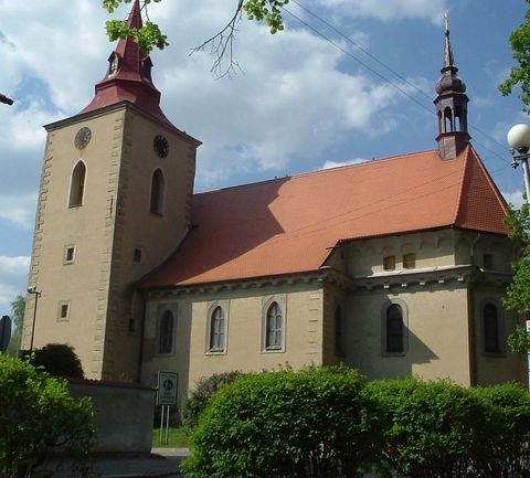 Kostel sv. Bartoloměje v Bakově nad Jizerou.